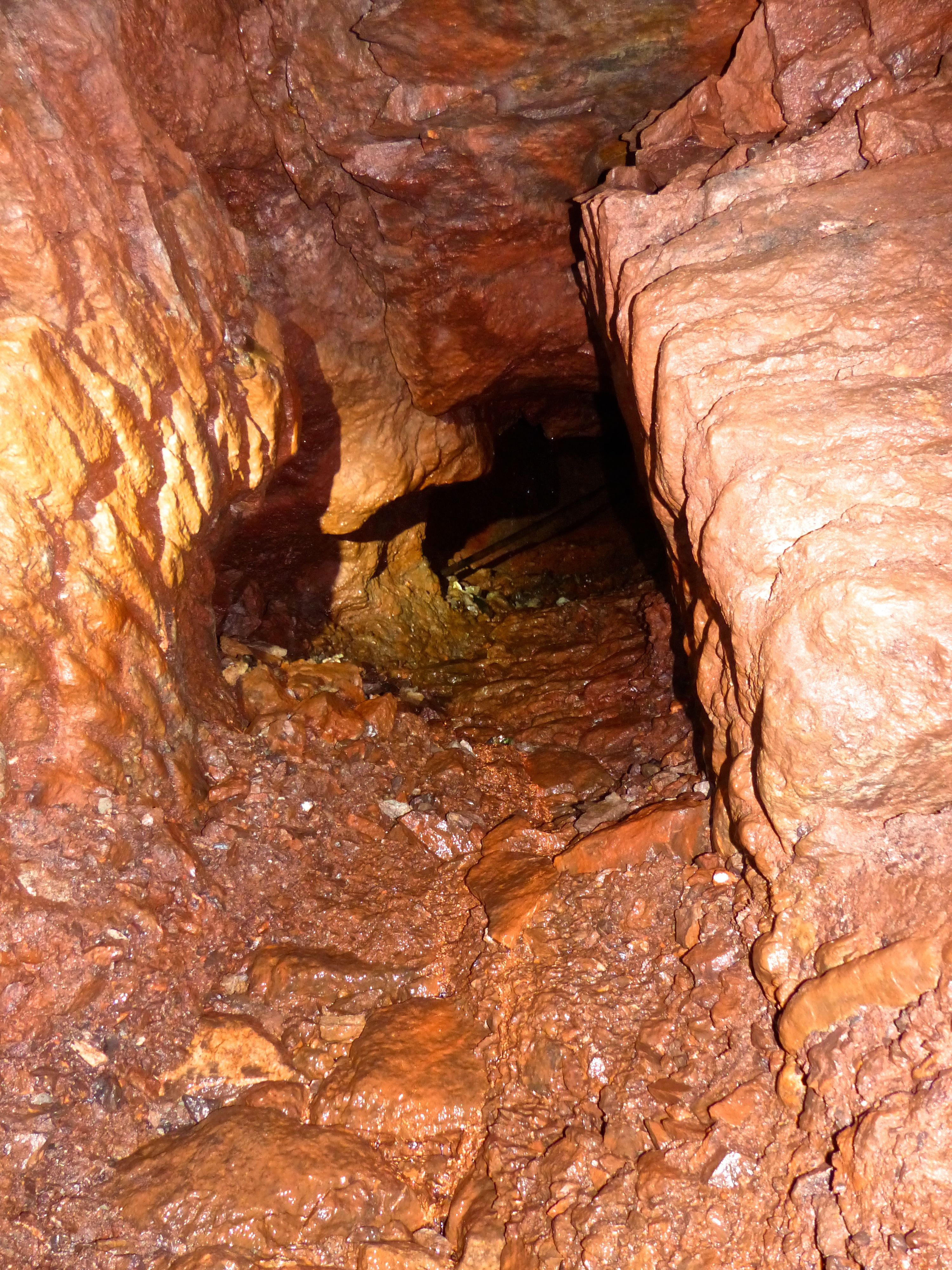 Philippstollen des Briloner Eisenberges: Erzrolle, partiell verbrochen